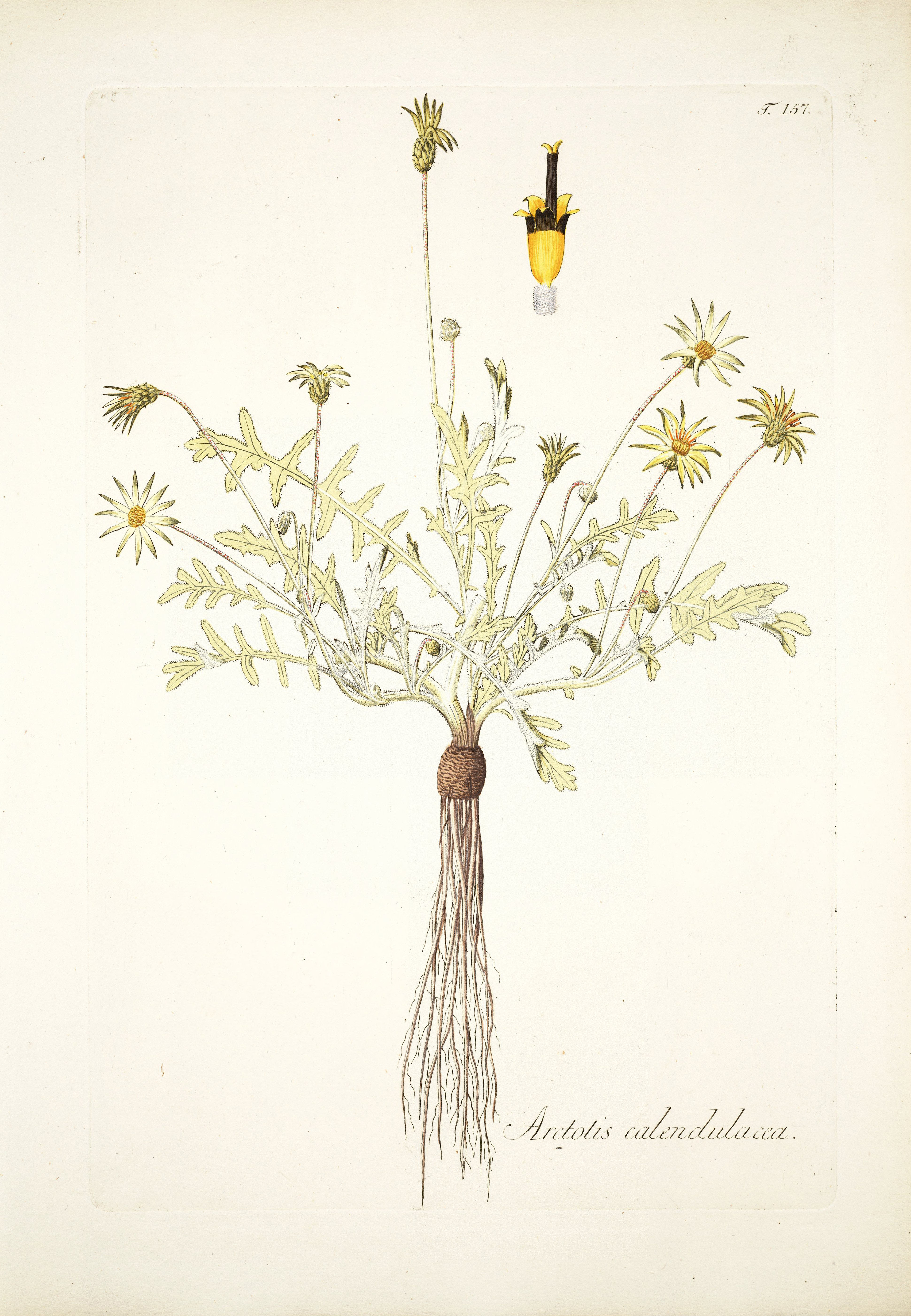 Legende: Ganze Pflanze. Röhrenblüte (vergr.).